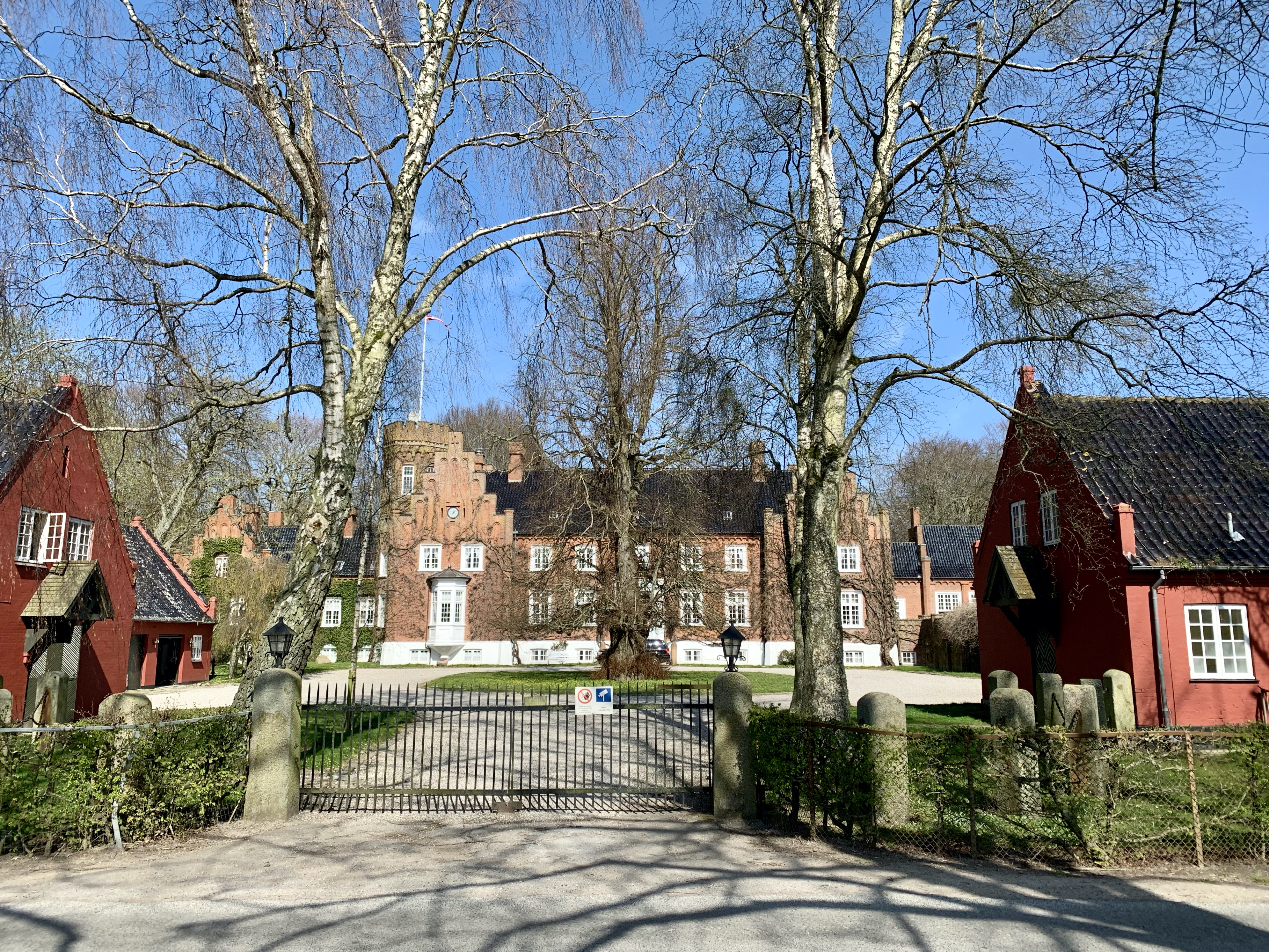 Krabbesholm i Gershøj Sogn, Hornsherred